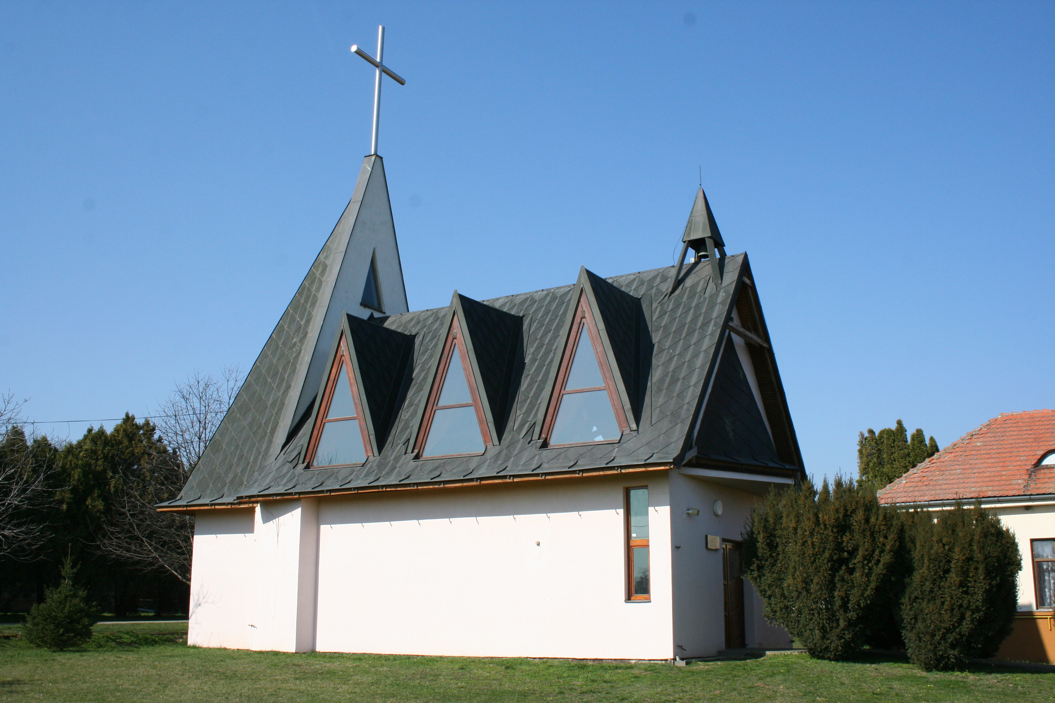 Újpuszta